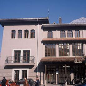 Ayuntamiento de Yernes y Tameza